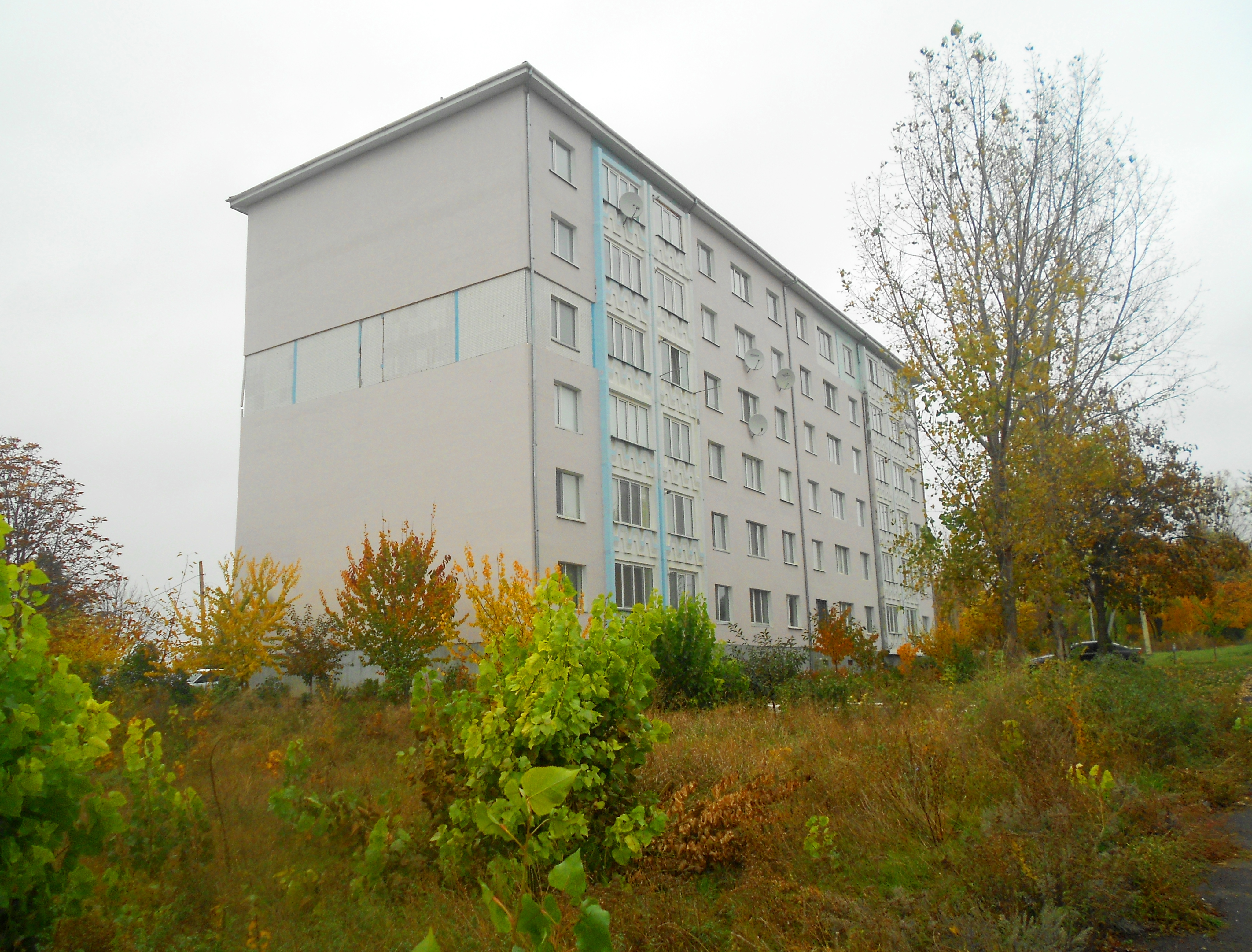 Bloc locativ în Florești